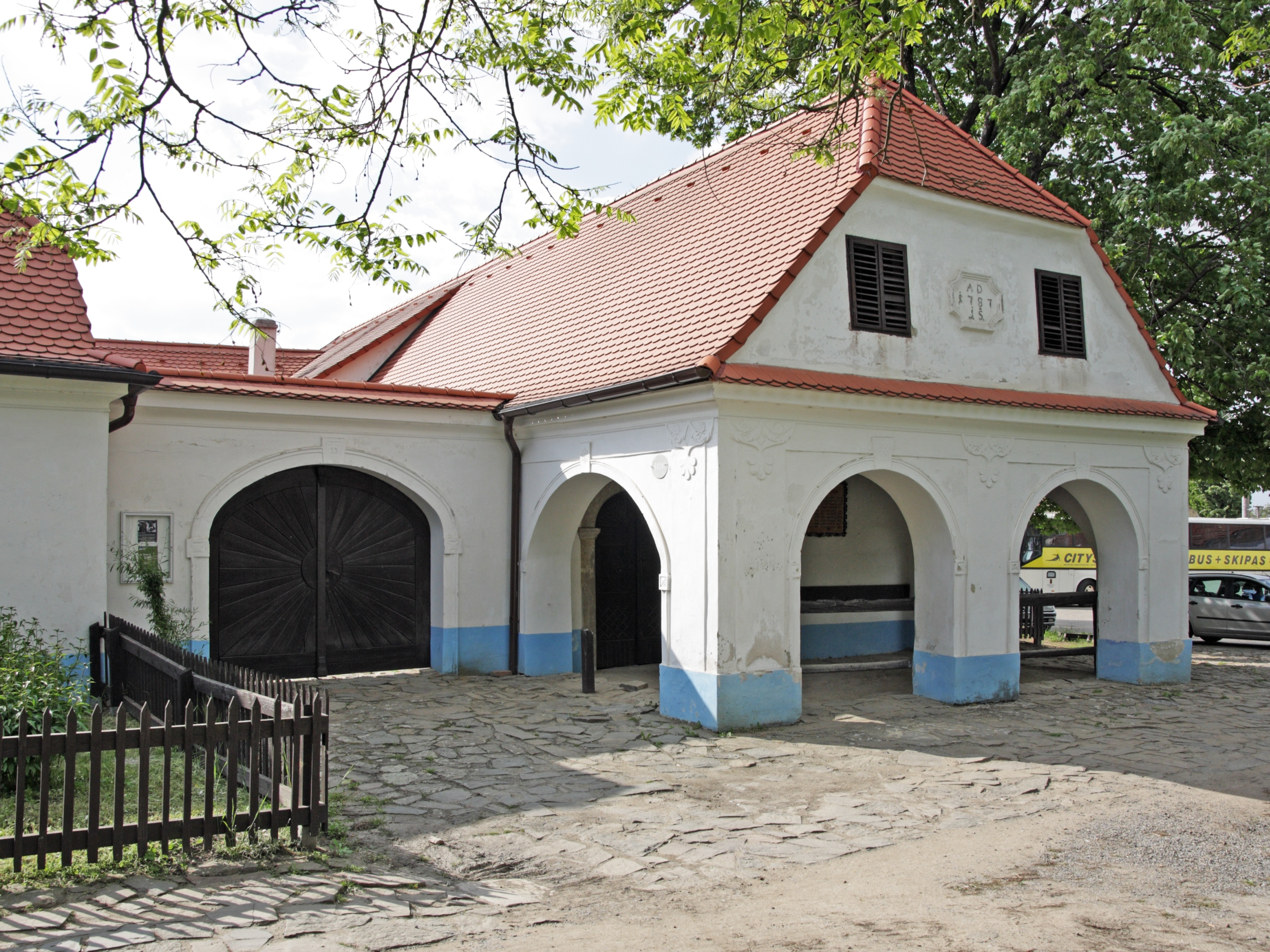 Těšany - barokní kovárna.